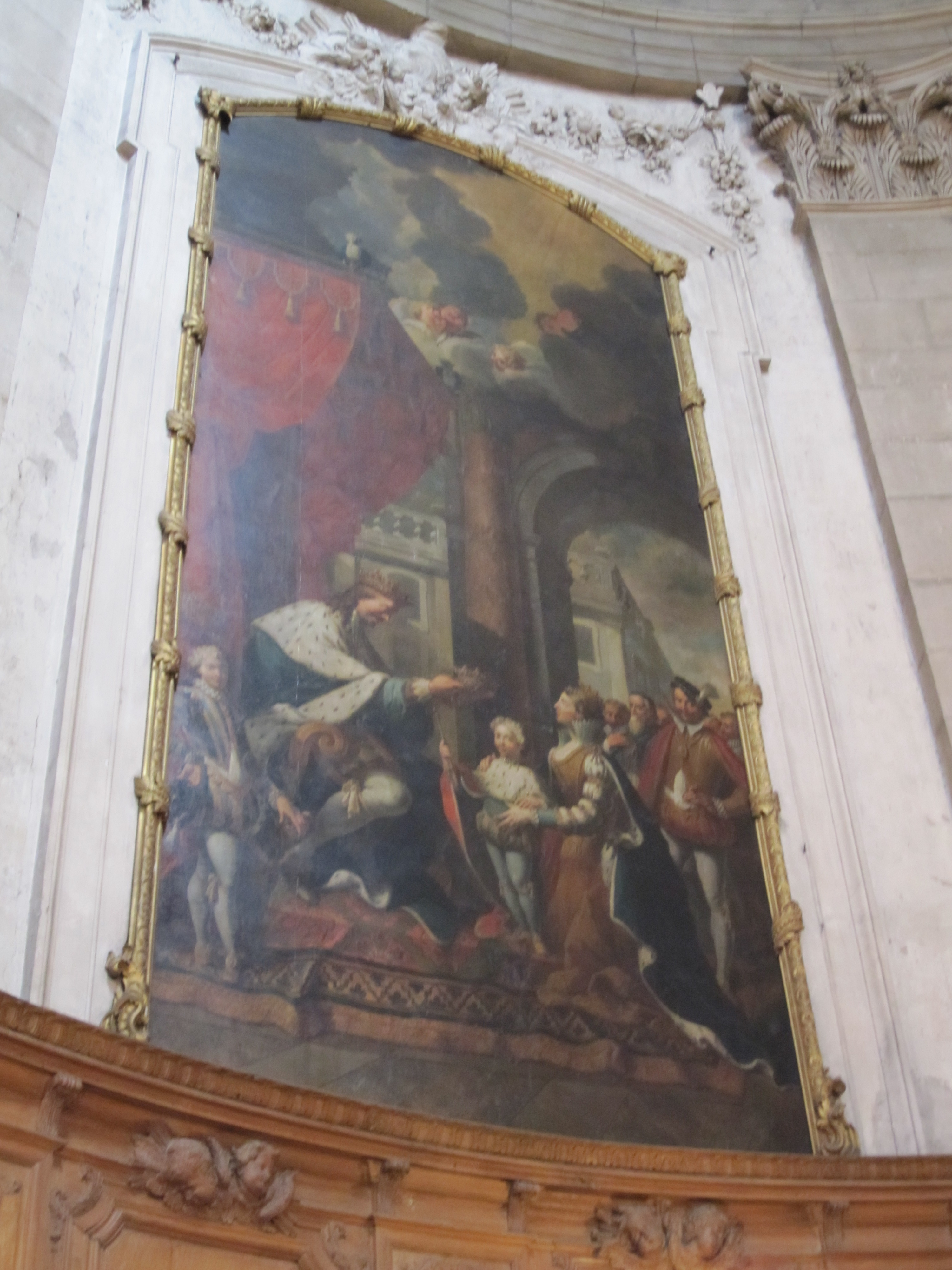 Claude Charles (1661-1747) - Couronnement de saint Sigisbert